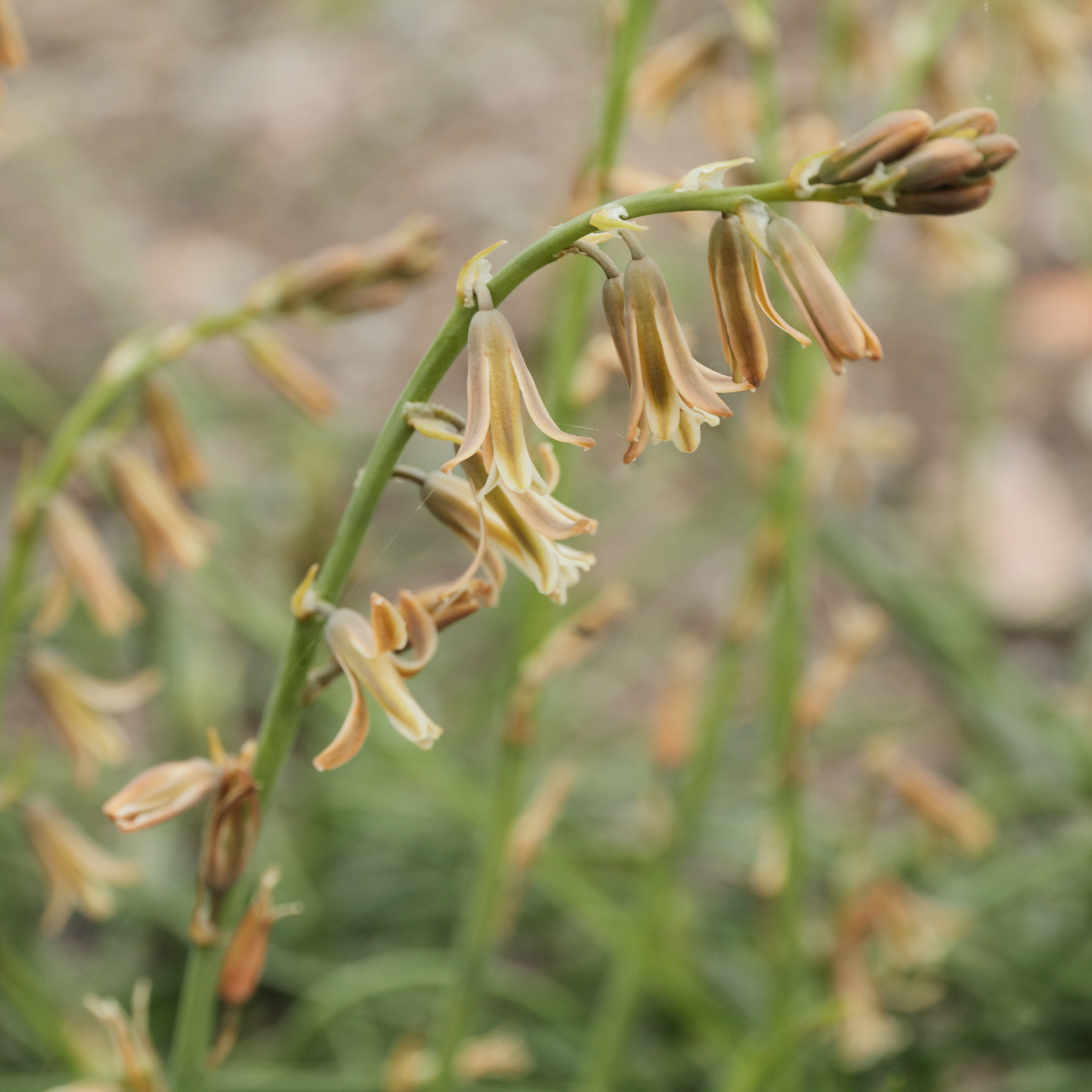 Dipcadi serotinum i Bergianska trädgården.